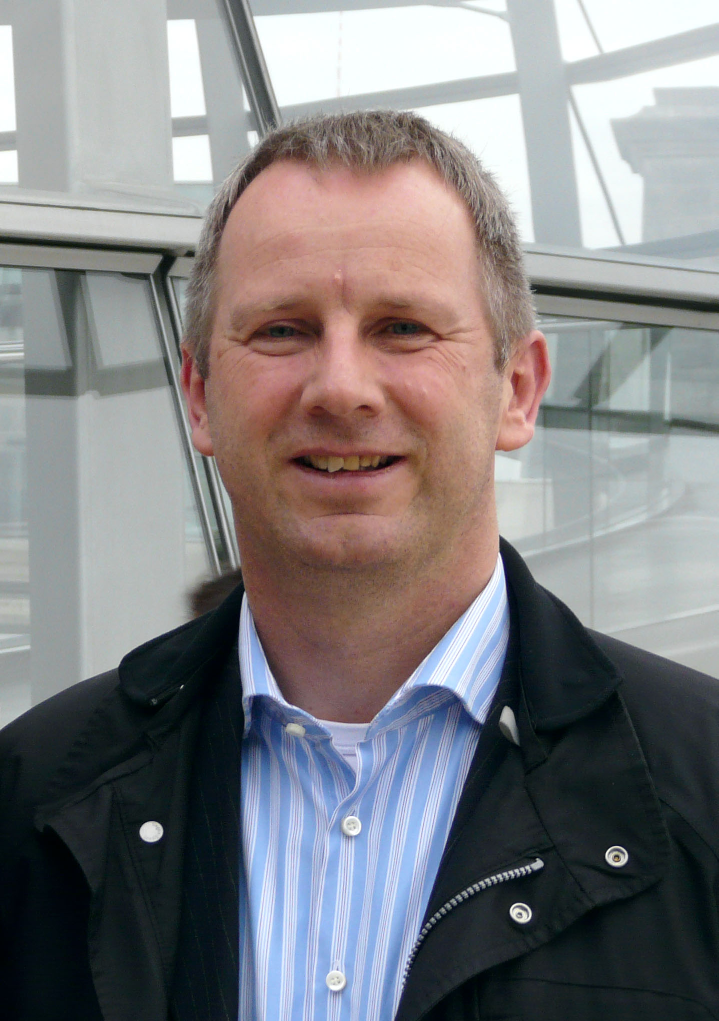 Johannes Kahrs 2008 auf der Terrasse des Reichstagsgebäudes in Berlin am 6. Dezember 2008.